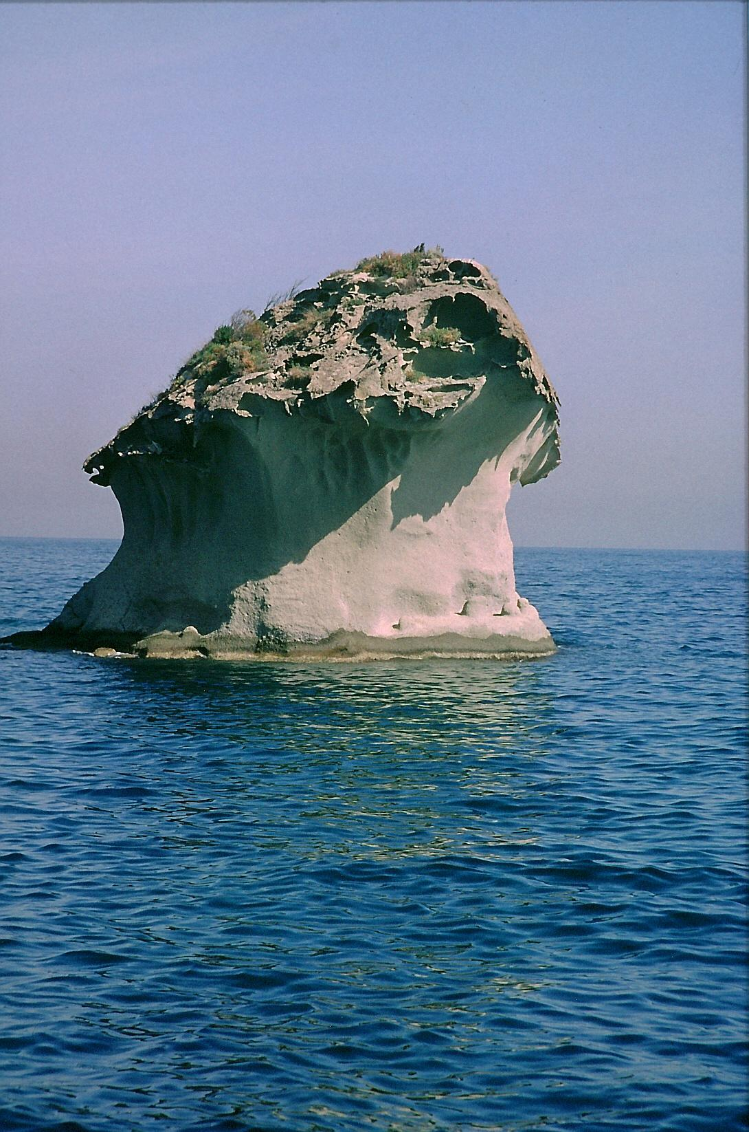 Der sogenannte Fungo in Lacco Ameno auf der Insel Ischia.